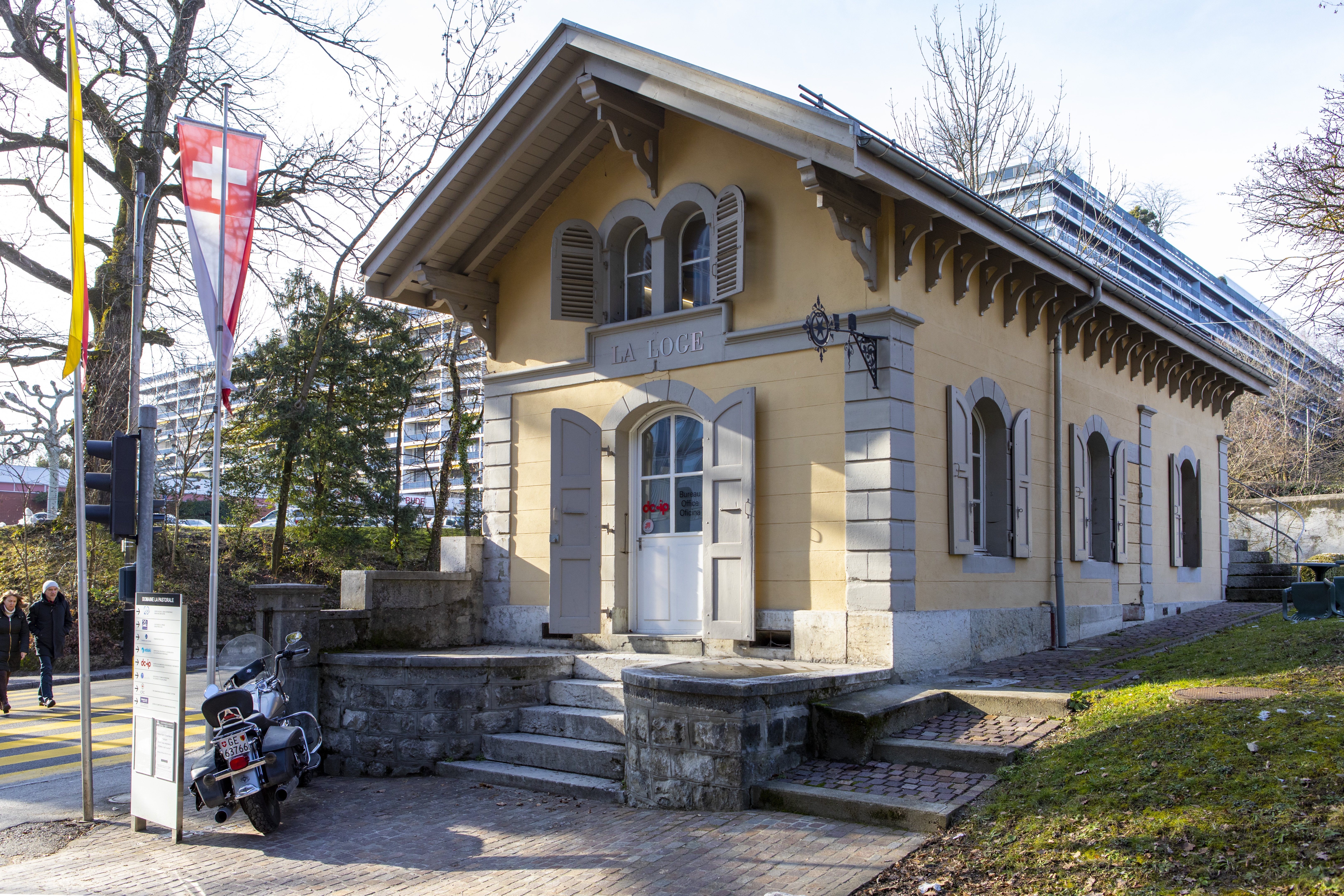 Bureau du Docip à Genève (2019)